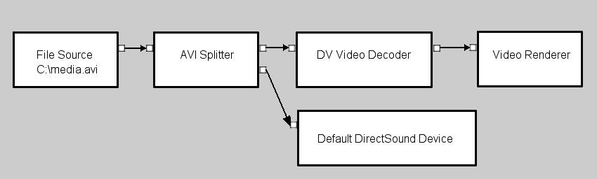 Łańcuch filtrów odtwarzający zawartość pliku AVI w formacie DV. Najpierw strumień jest odczytany z pliku i rozdzielony na strumienie wideo i audio. Strumień audio trafia bezpośrednio do karty dźwiękowej, a strumień wideo po rozkodowaniu zostaje wyświetlony na ekranie przez filtr renderujący